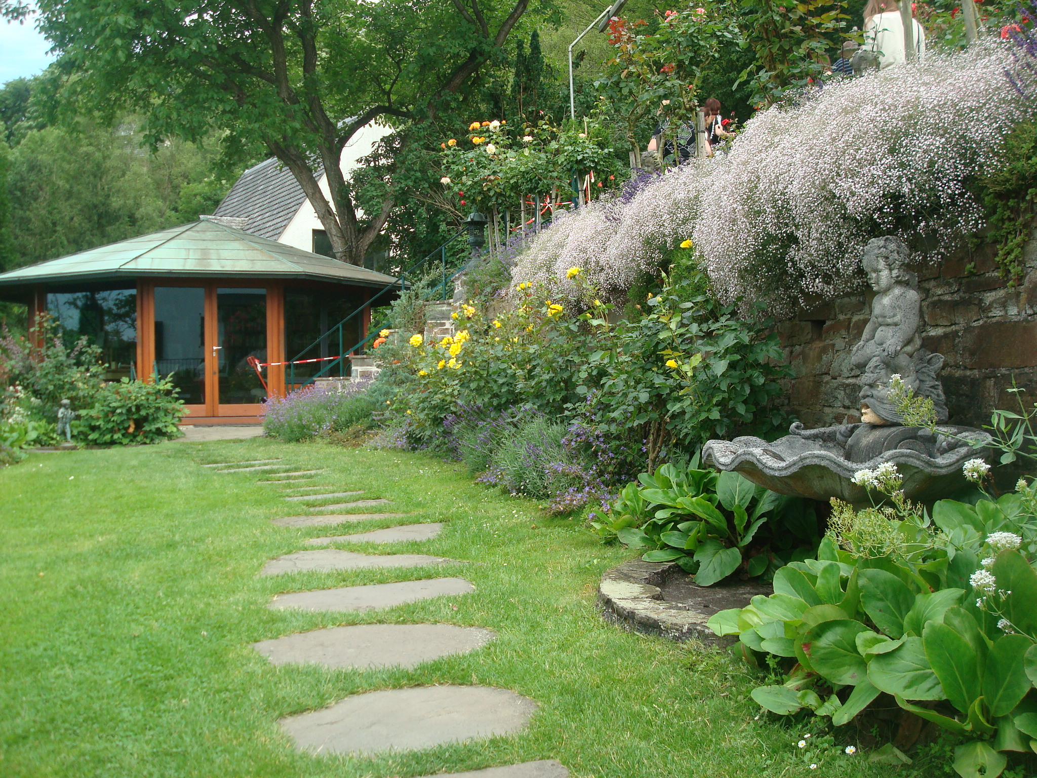 KonradAdenauer-alcove.JPG: Альтанка у маєтку Конрада Аденауера в селі Рендорф